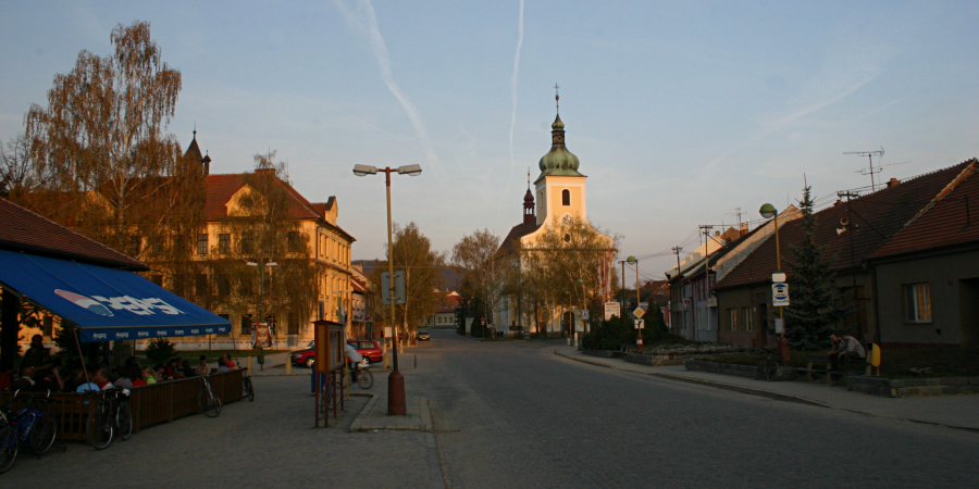 Náměstí ve Veverské Bítýšce v dubnu 2006: v centru kostel svatého Jakuba, v levém rohu základní škola.